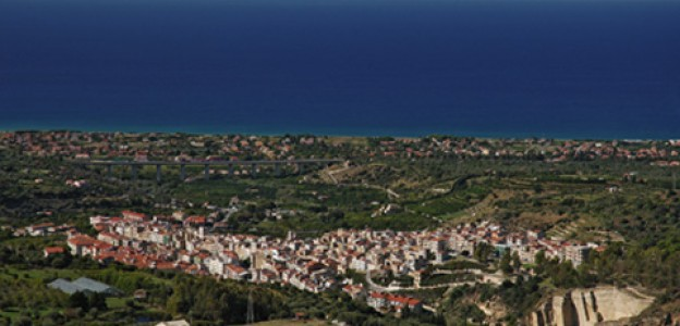 Panorama di Lascari